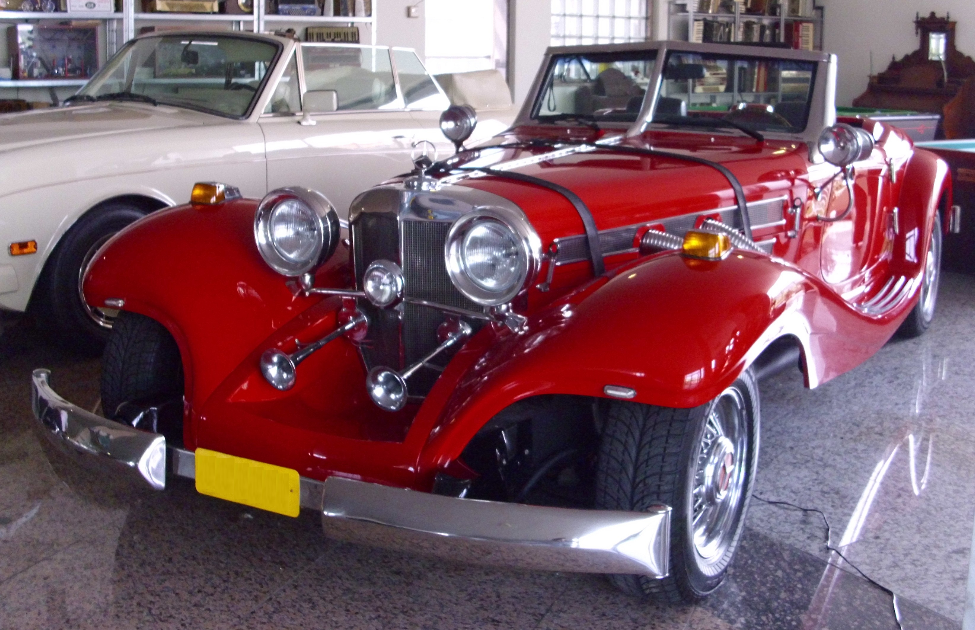 Heritage 500 K Roadster Replika 1989